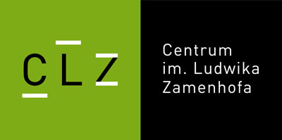 Logo Centrum im. Ludwika Zamenhofa w BiałymstokuEsperanto: Logotipo de la Centro Ludoviko Zamenhof en Bjalistoko